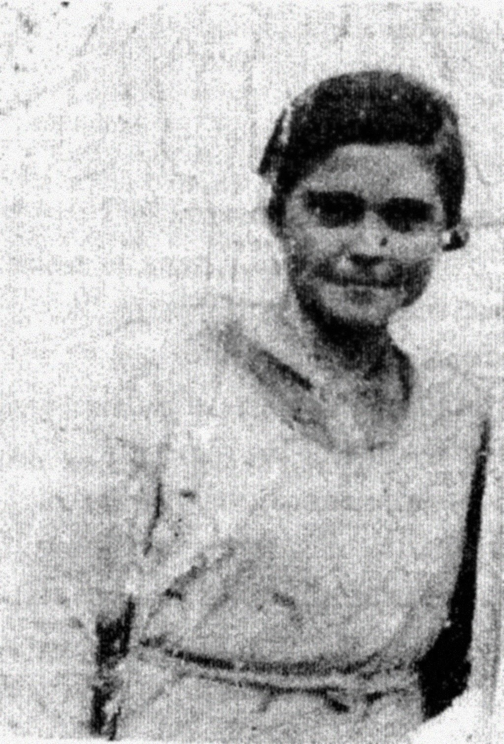 Maravillas Lamberto Yoldi (Larraga, Navarra, España, 28 de junio de 1922 - id., 15 de agosto de 1936) fue una de las víctimas del bando sublevado en la Guerra Civil en Navarra con apenas catorce años de edad.